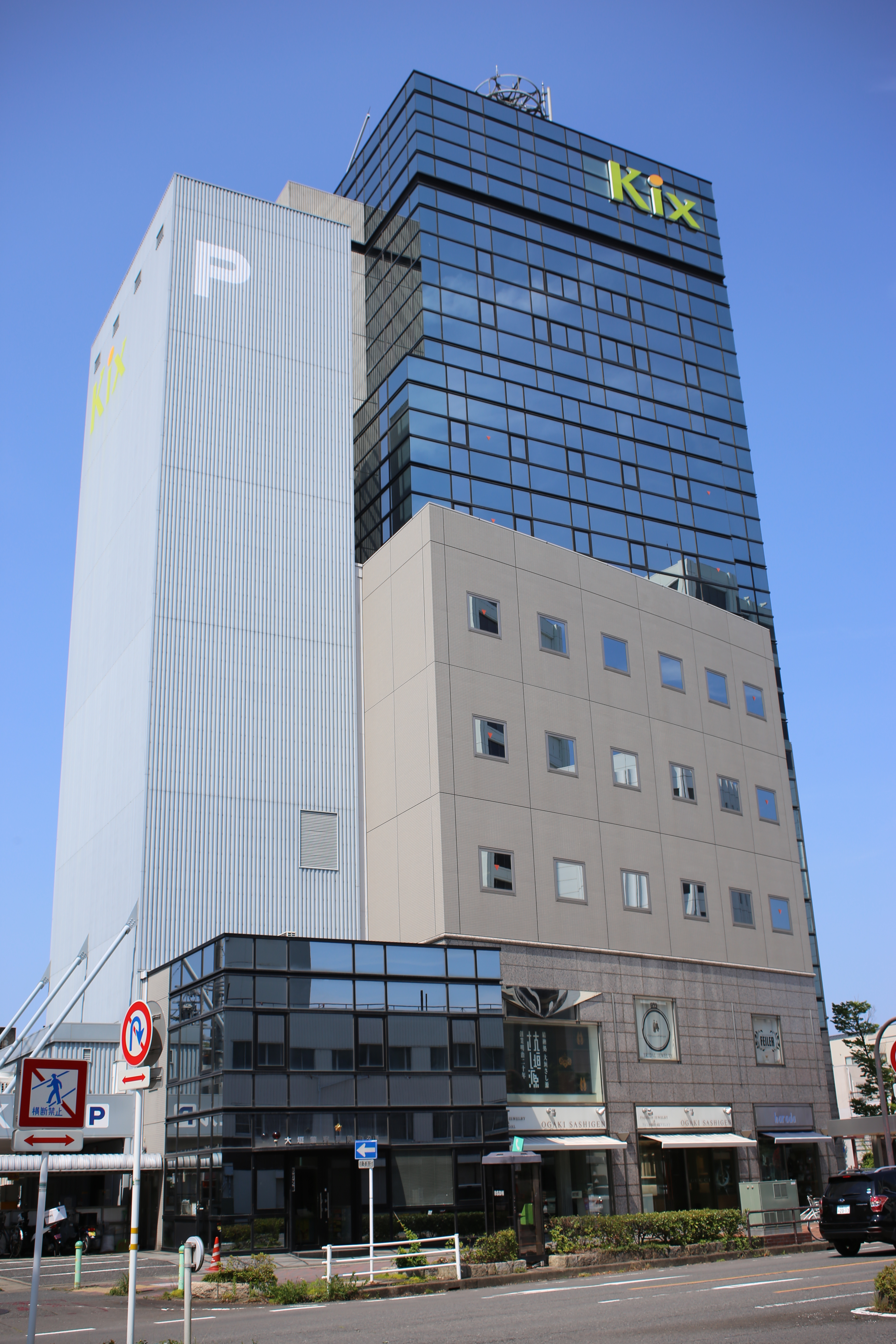 岐阜県大垣市郭町のKixビルを南側公道西側より撮影